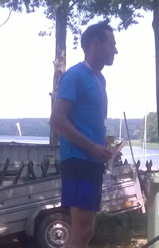 Radosław Popławski podczas dekoracji X Niesulickiej Piątki